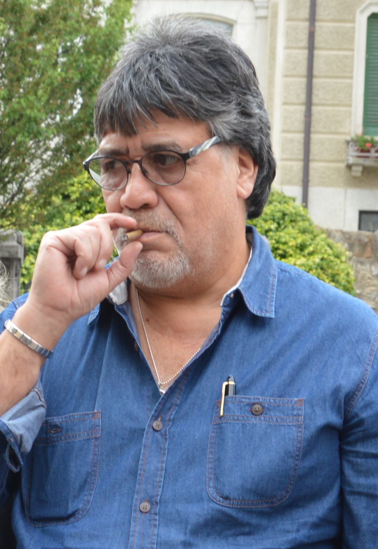 10 maggio 2014